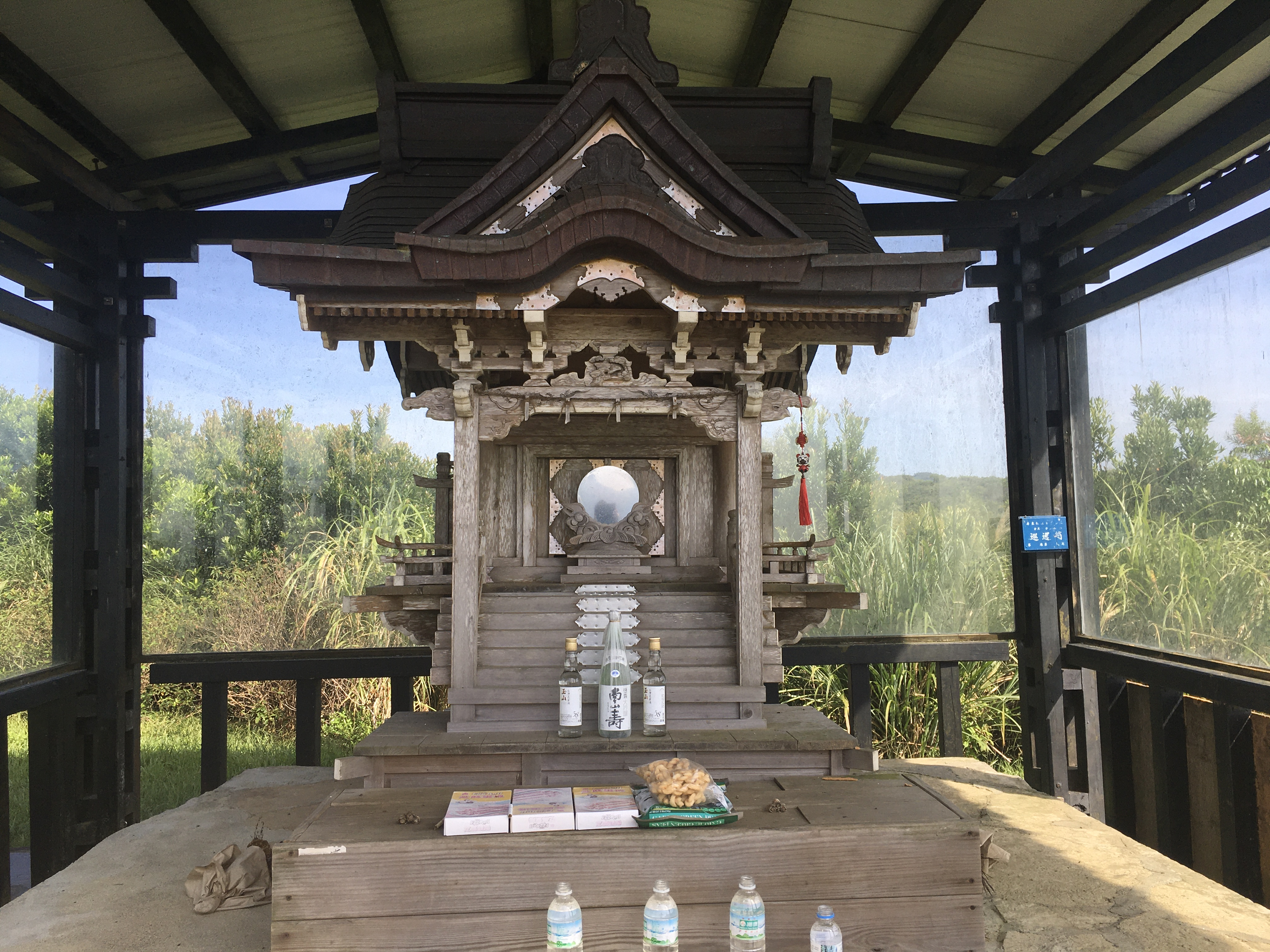 Gaoshih Shinto Shrine (Kuskus Jinja), Mudan, Pingtung, Taiwan